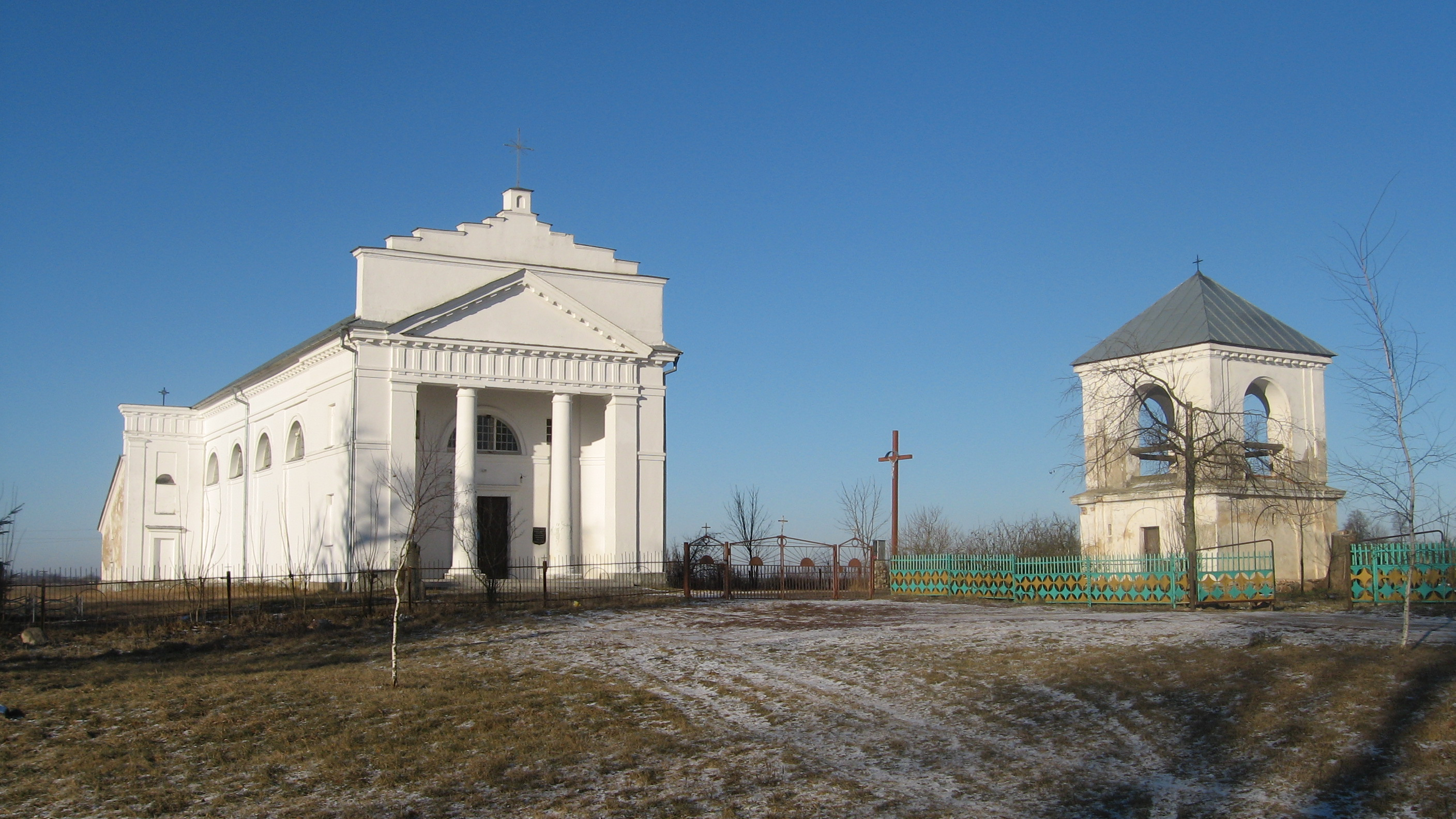 Беларуская (тарашкевіца): Сваятычы